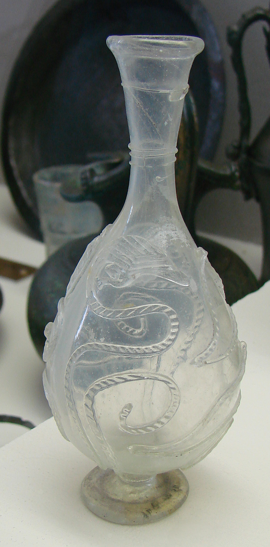 Verrerie gallo-romaine:fiole à décor vermiculé,3ème s.+ JC.Musée Saint-Remi à Reims, Marne, France.